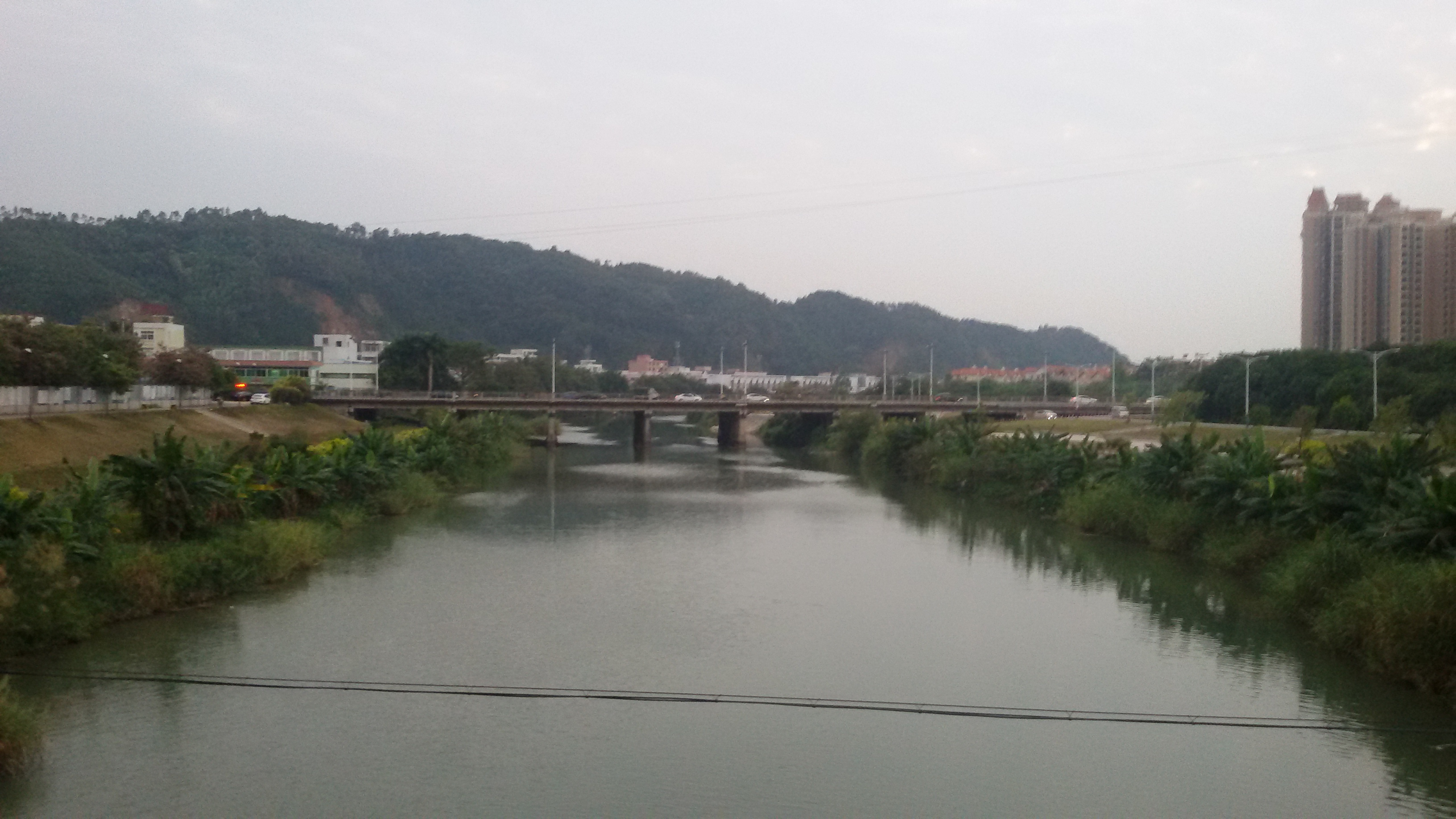 粵語: 从化小海河